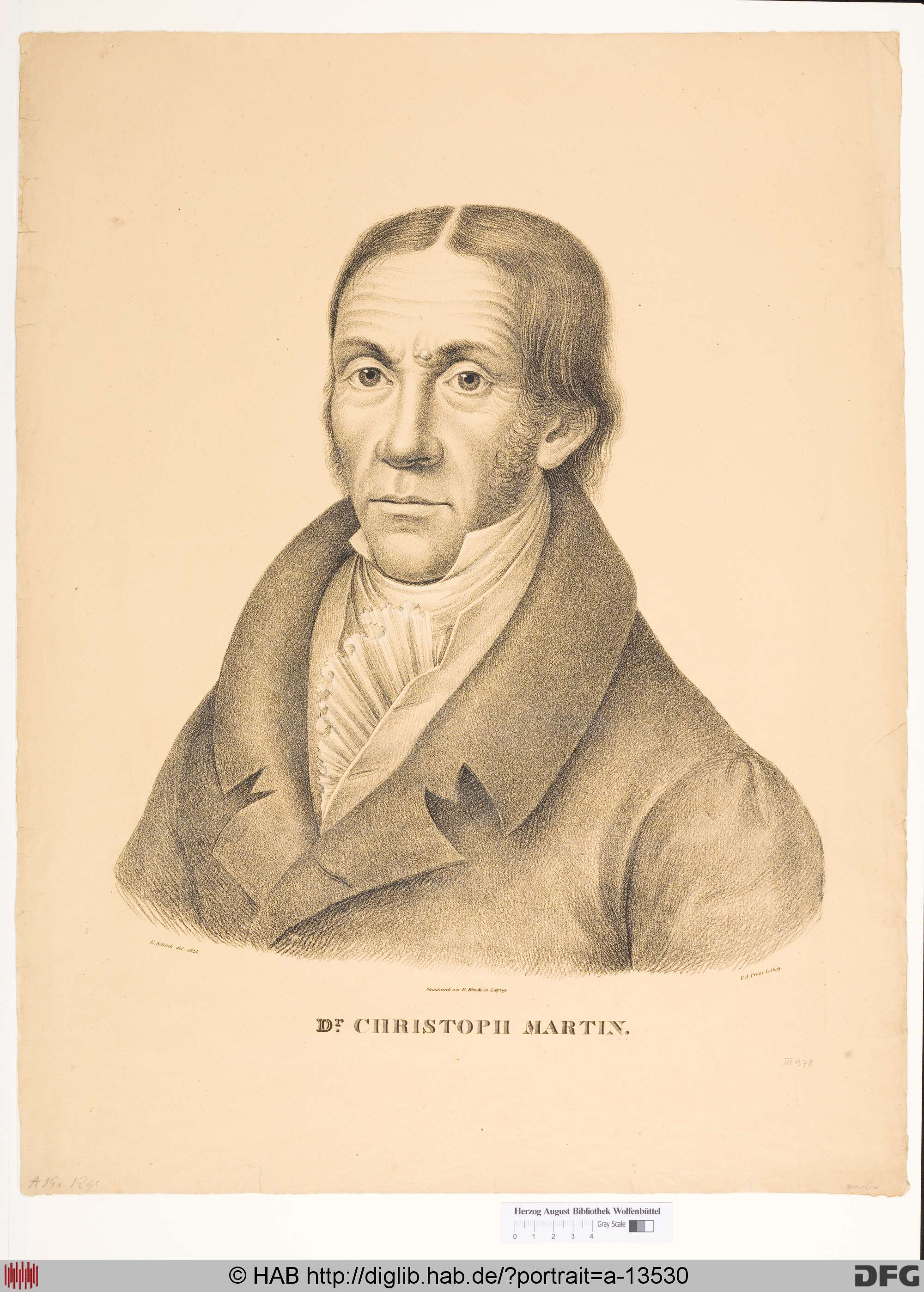 Porträt des Rechtswissenschaftlers Christoph Martin (1772-1857)